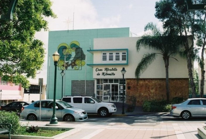 Casa Alcaldía de Aibonito, Puerto Rico